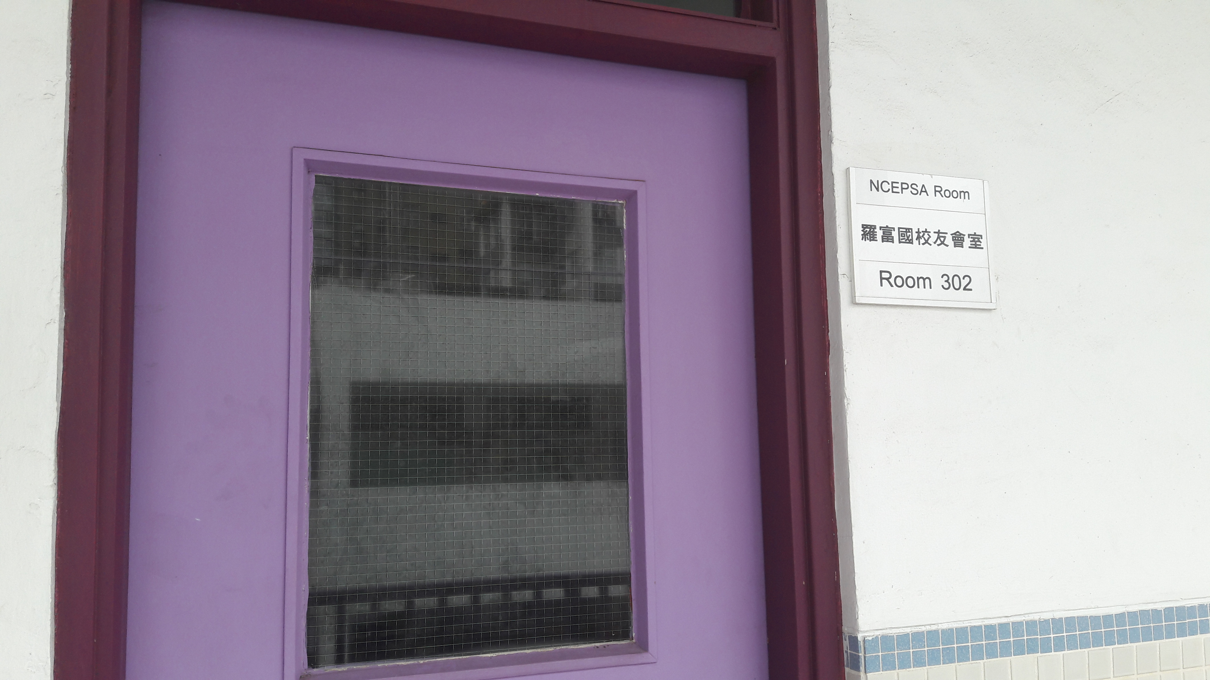 羅富國校友會室